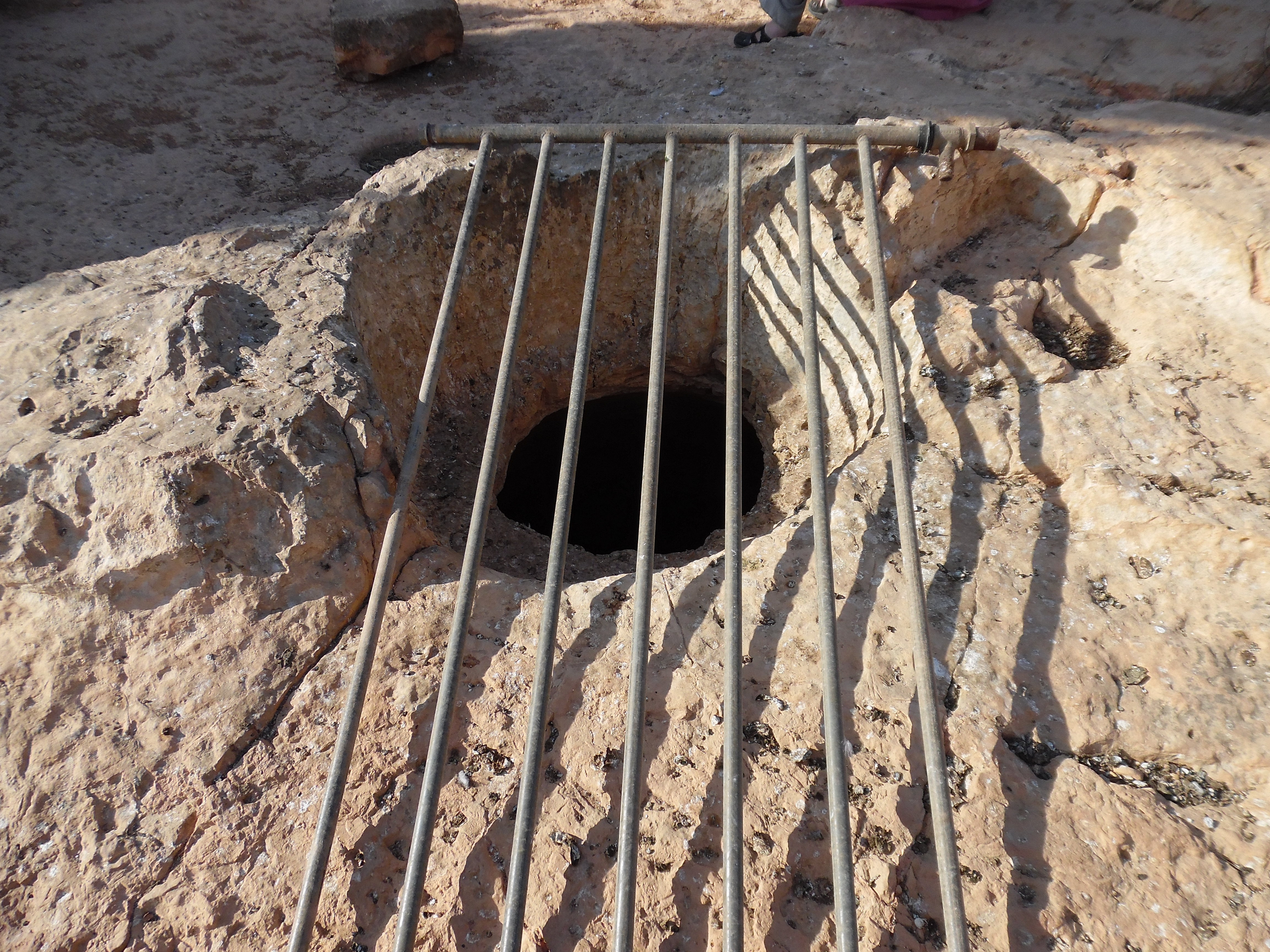 עיר קדומה בארץ ישראל. בירת ממלכת ישראל במאות ה-9 וה-8 לפנה"ס.